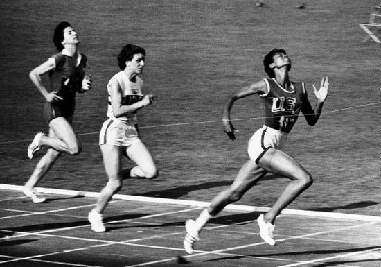 Giuseppina Leone in azione in una gara in Italia nel 1960